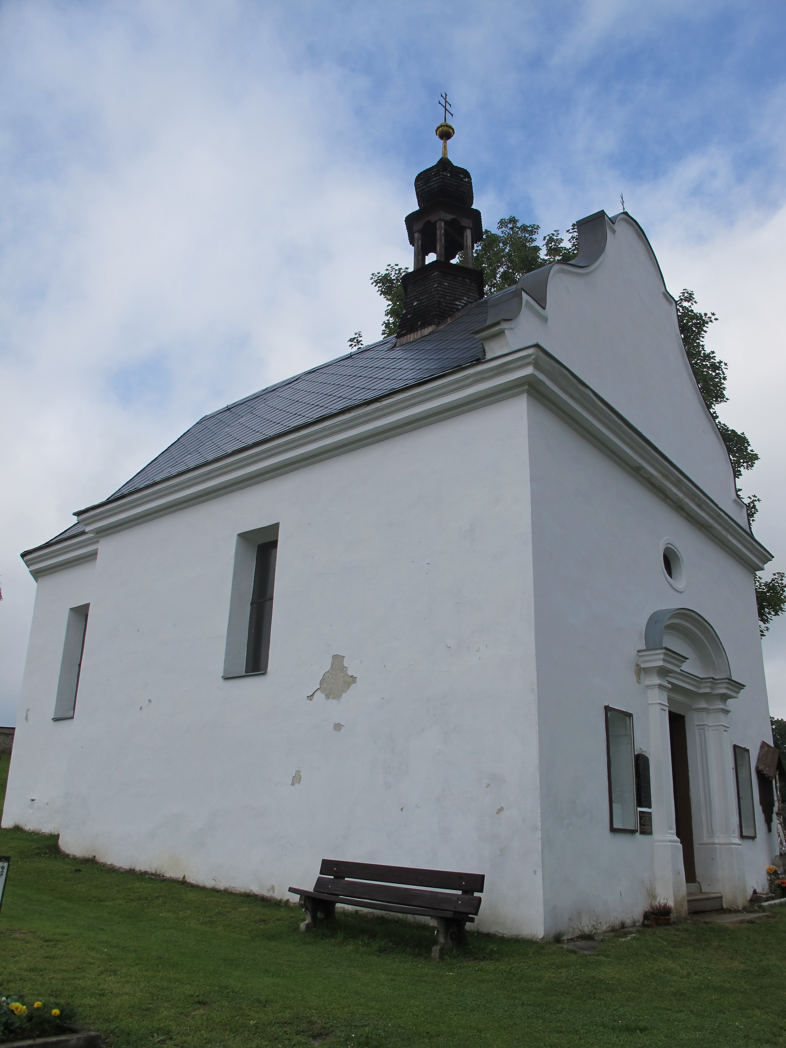 Kaple sv. Floriána, Volary.